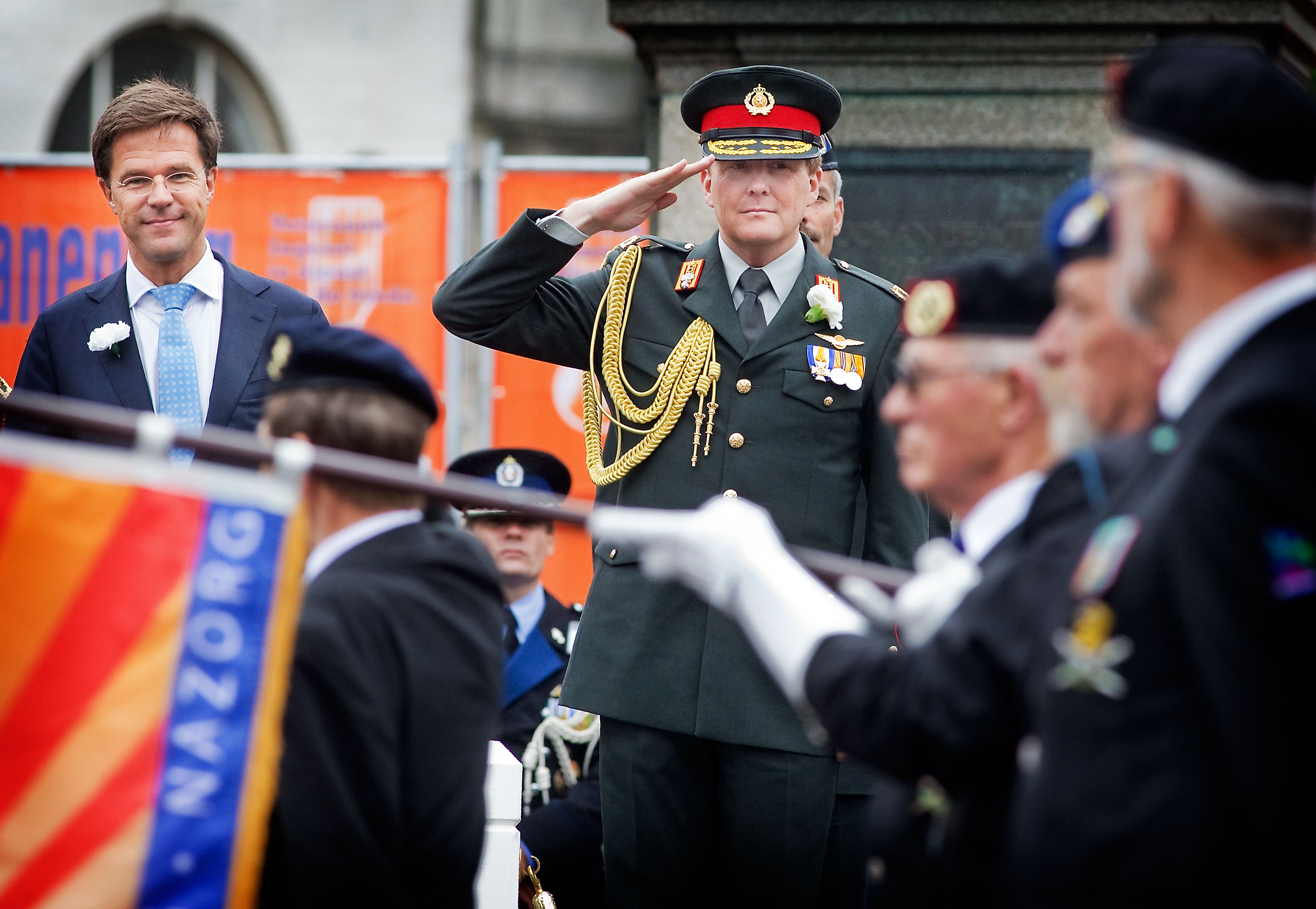 De Prins van Oranje en minister-president Rutte nemen het defilé af tijdens de zevende Nederlandse Veteranendag. Foto: Evert-Jan Daniels